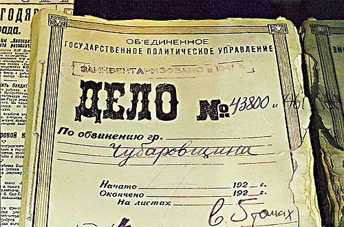 Обложка следственного дело о массовом изнасиловании в Ленинграде (Чубаровское дело), 1926